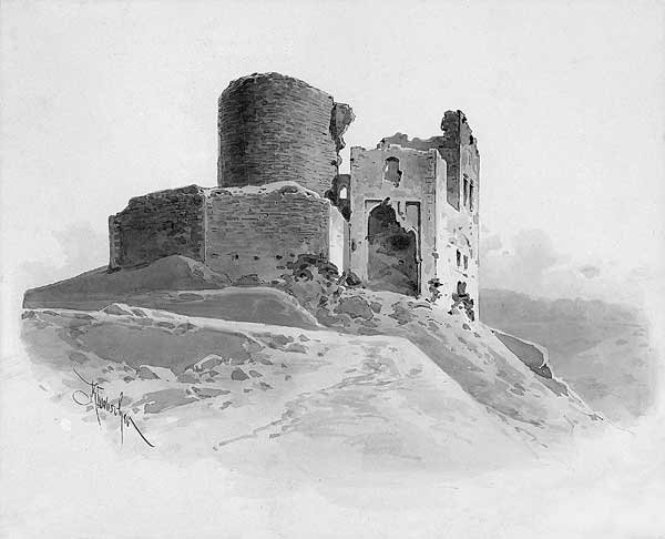 Česky: Hrad Krakovec od severu